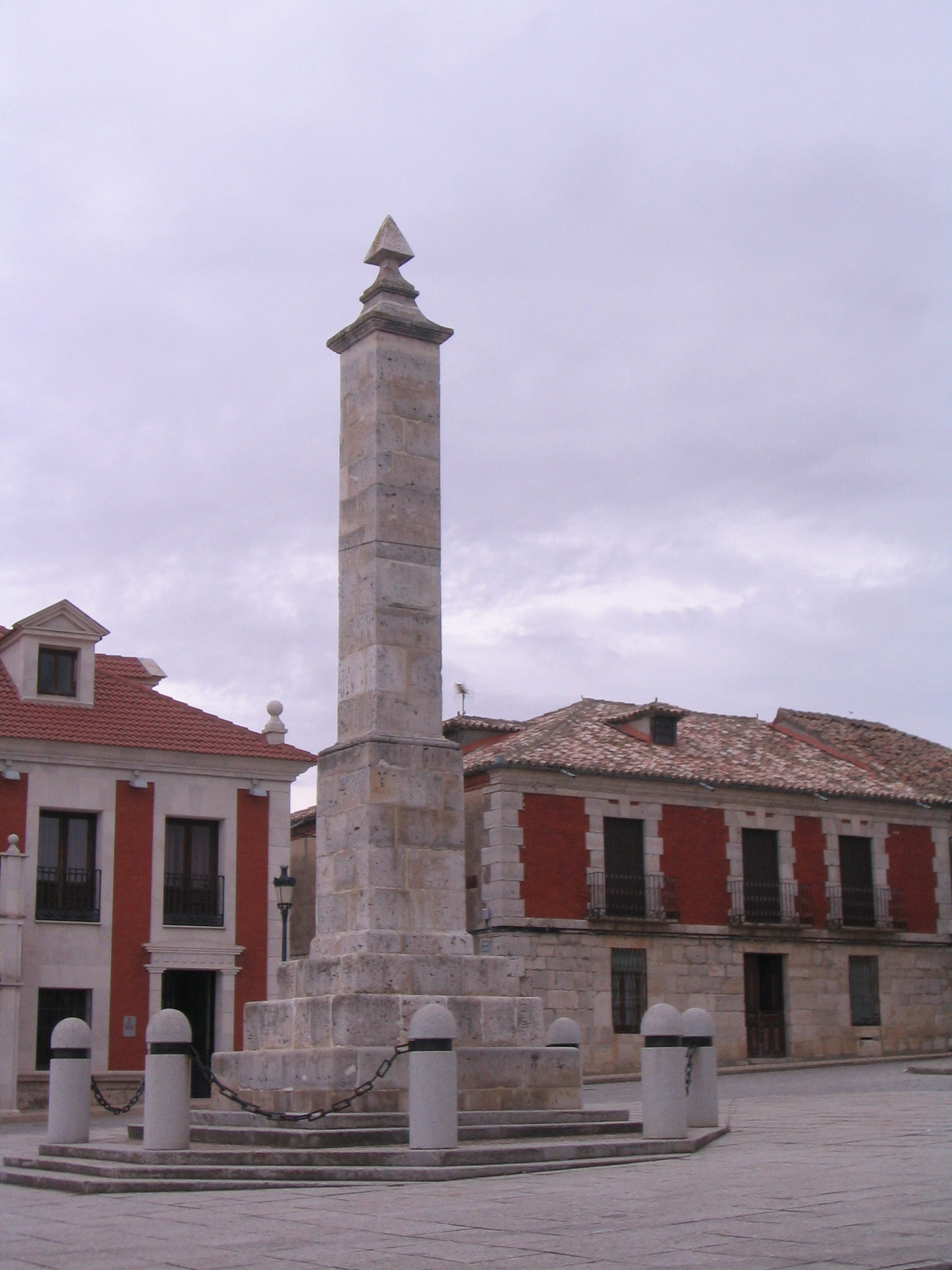 Monumento a los comuneros en Villalar de los Comuneros (Valladolid, España).